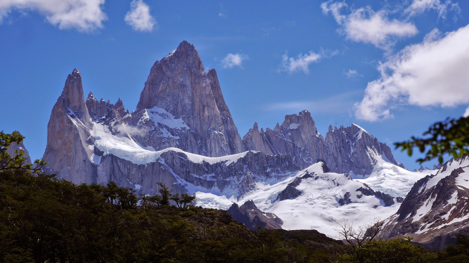 Monte Fitz Roy el 16 de Enero de 2015